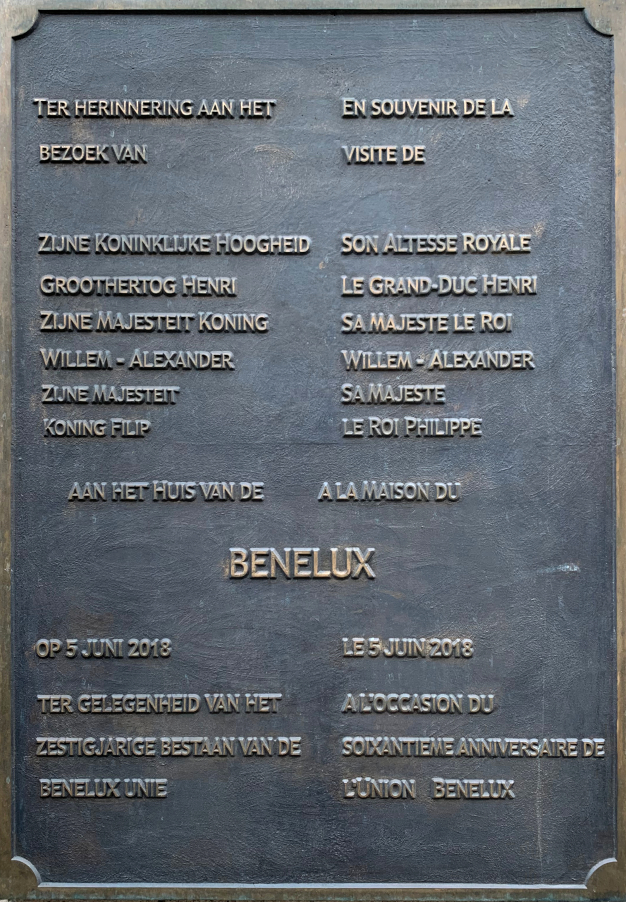 Plaque commémorative de la visite royale à la maison du Benelux en juin 2018.